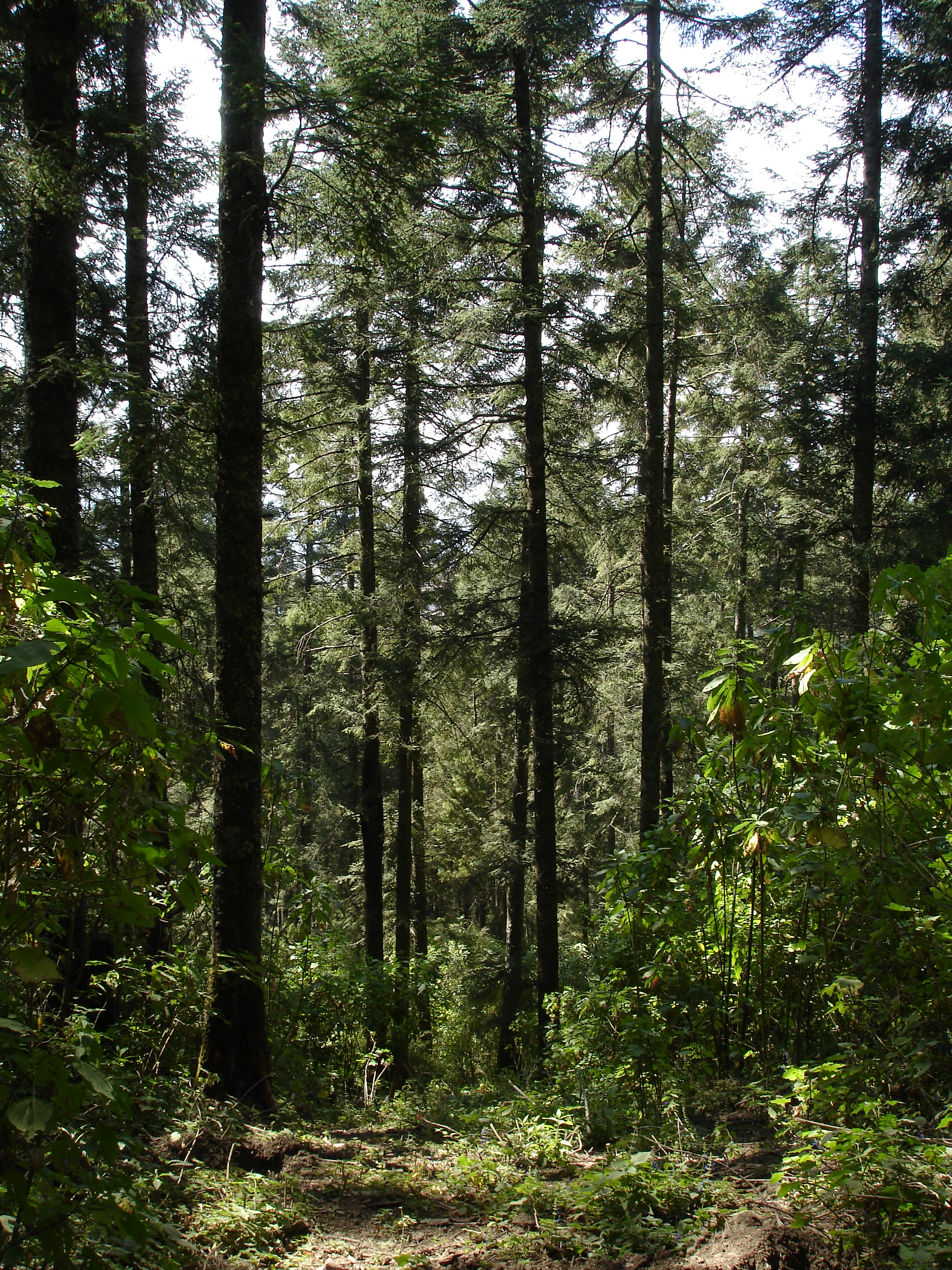 Sacred Fir Abies religiosa forest, El Rosario Monarch Sanctuary, Angangueo, Michoacán, Mexico